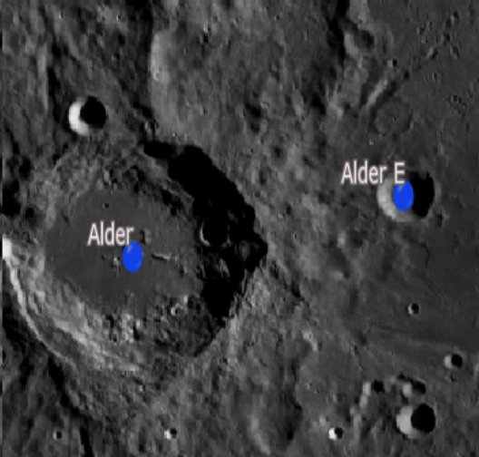 Cráter lunar Alder. Cráteres satélite. (Imagen LRO)